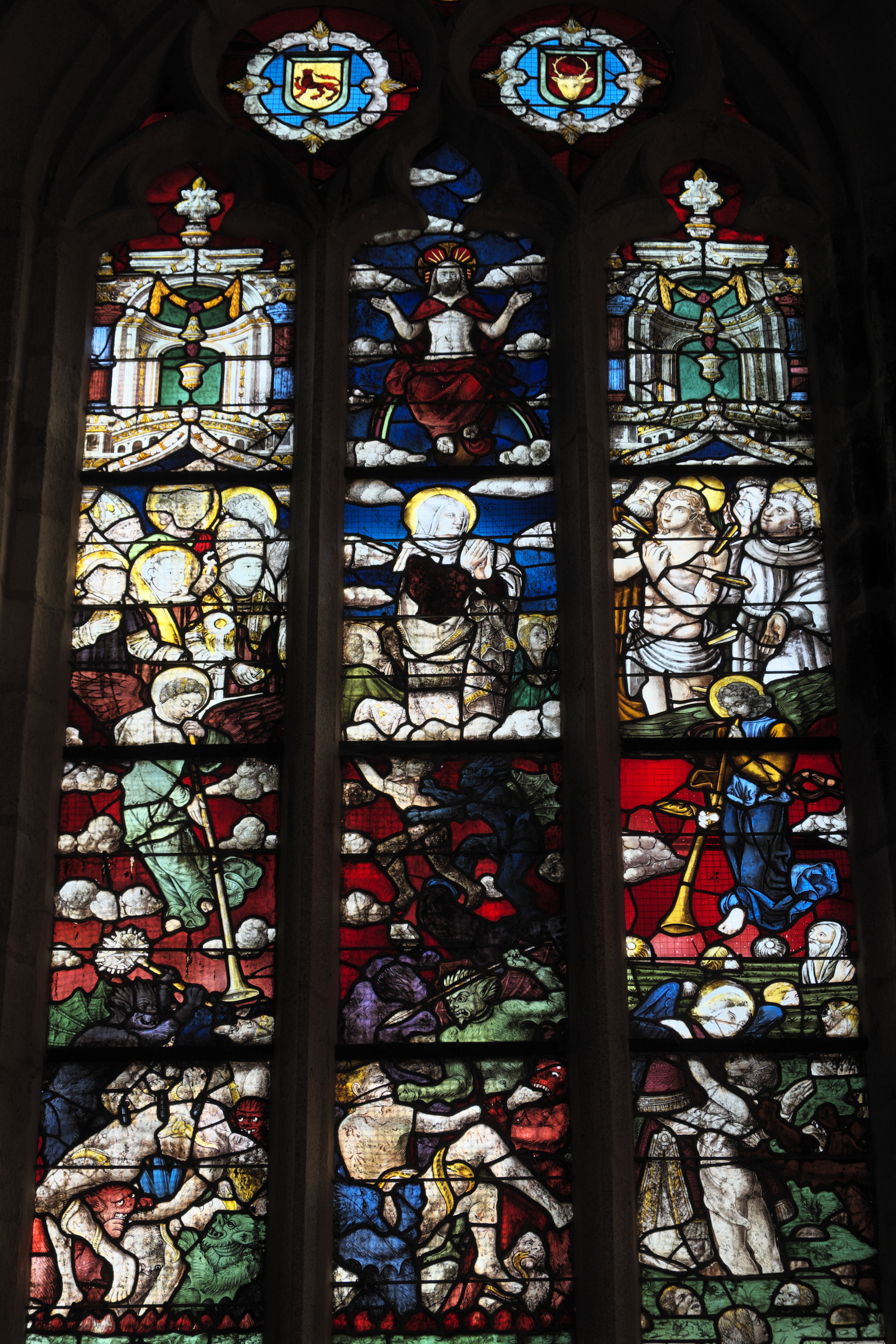 Katholische Pfarrkirche Saint-Thurien in Plogonnec im Département Finistère (Region Bretagne/Frankreich), Bleiglasfenster (baie 2) um 1500 und 1520/25; Darstellung: Jüngstes Gericht, Maria und Heilige (oben); unten: Erzengel Michael mit Stifter (links), Verkündigung (Mitte), heilige Barbara mit Stifterin (rechts)